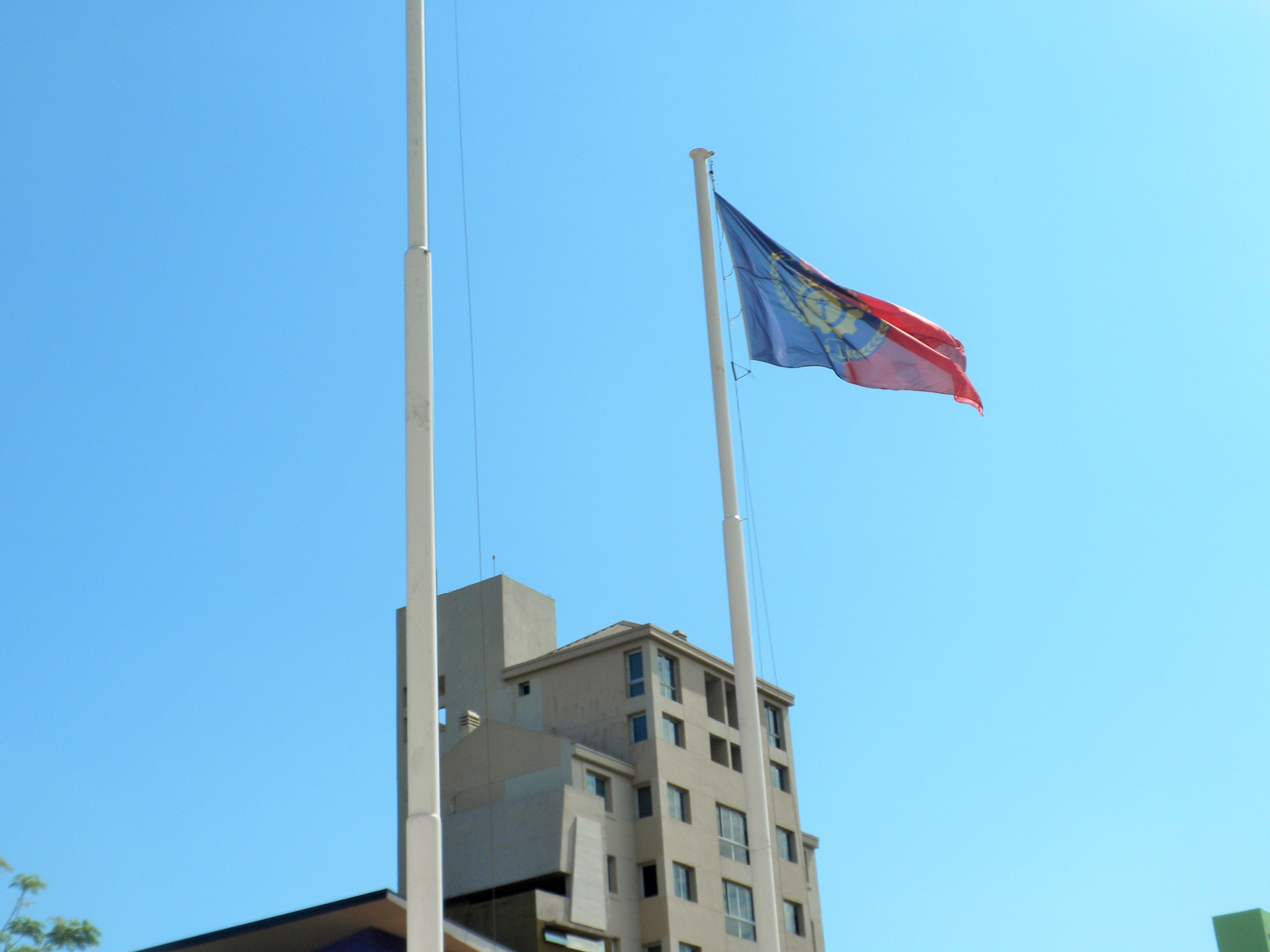 Bandera de la Ciudad de Posadas en el Mástil de la intersección de la Avenida Uruguay y Avenida Mitre. Fotoː Horacio Cambeiro.